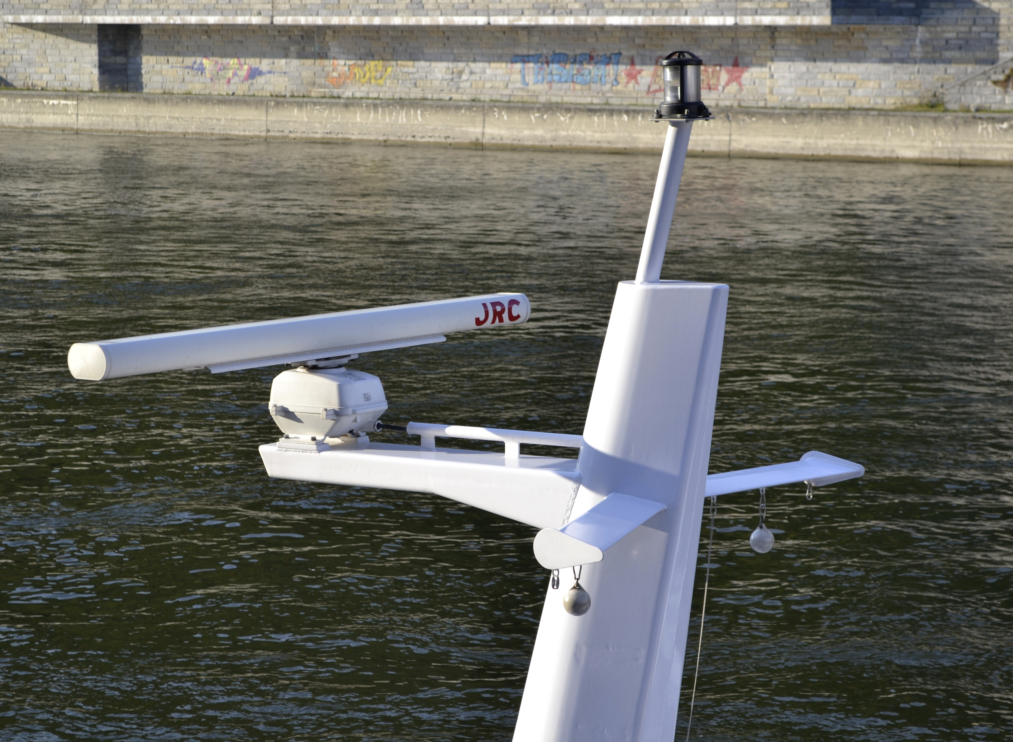 Das Schiffsradar des Passagierschiffs Scenic Emerald.